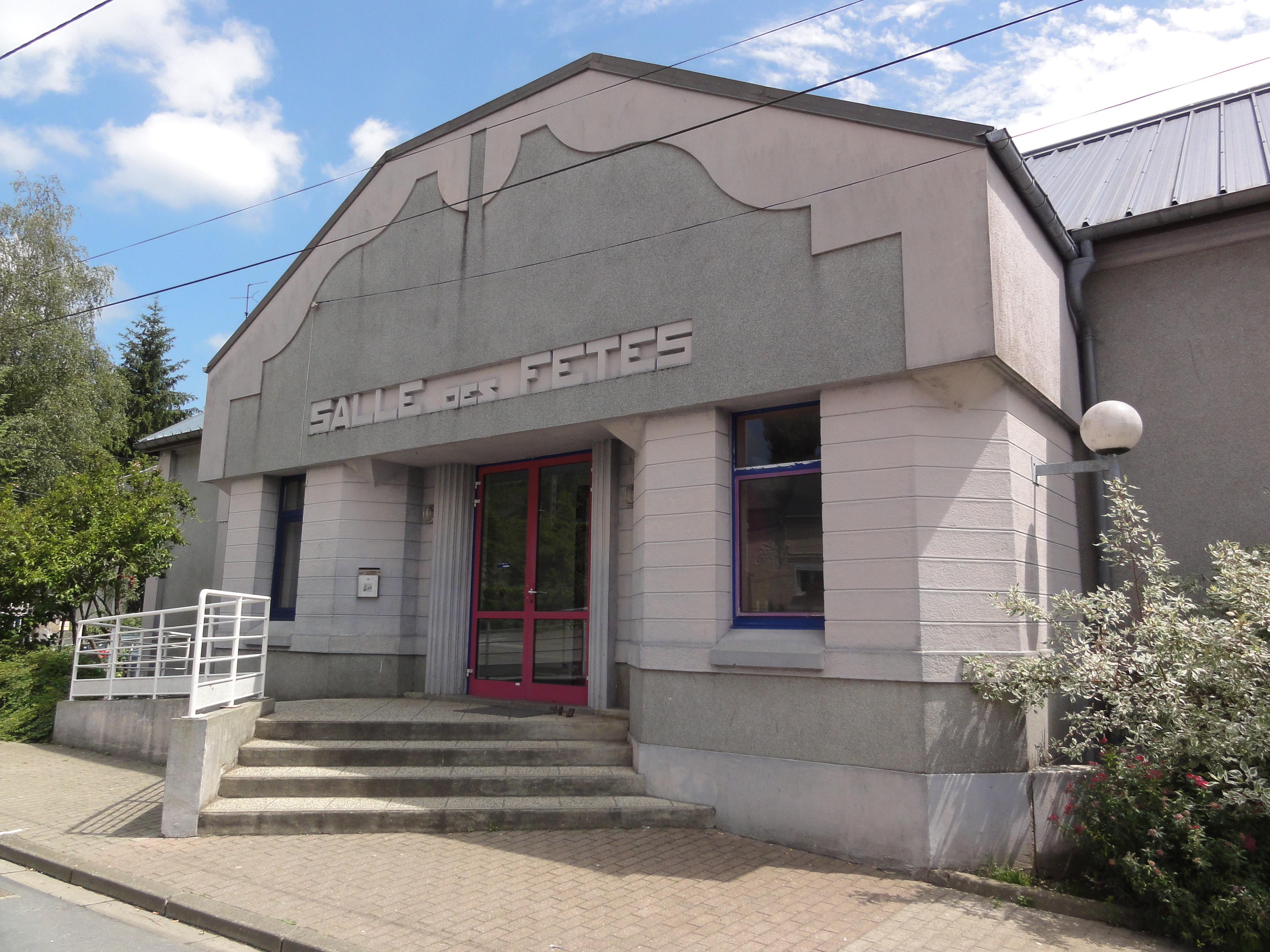 Vieux-Reng (Nord, Fr) Salle des fêtes